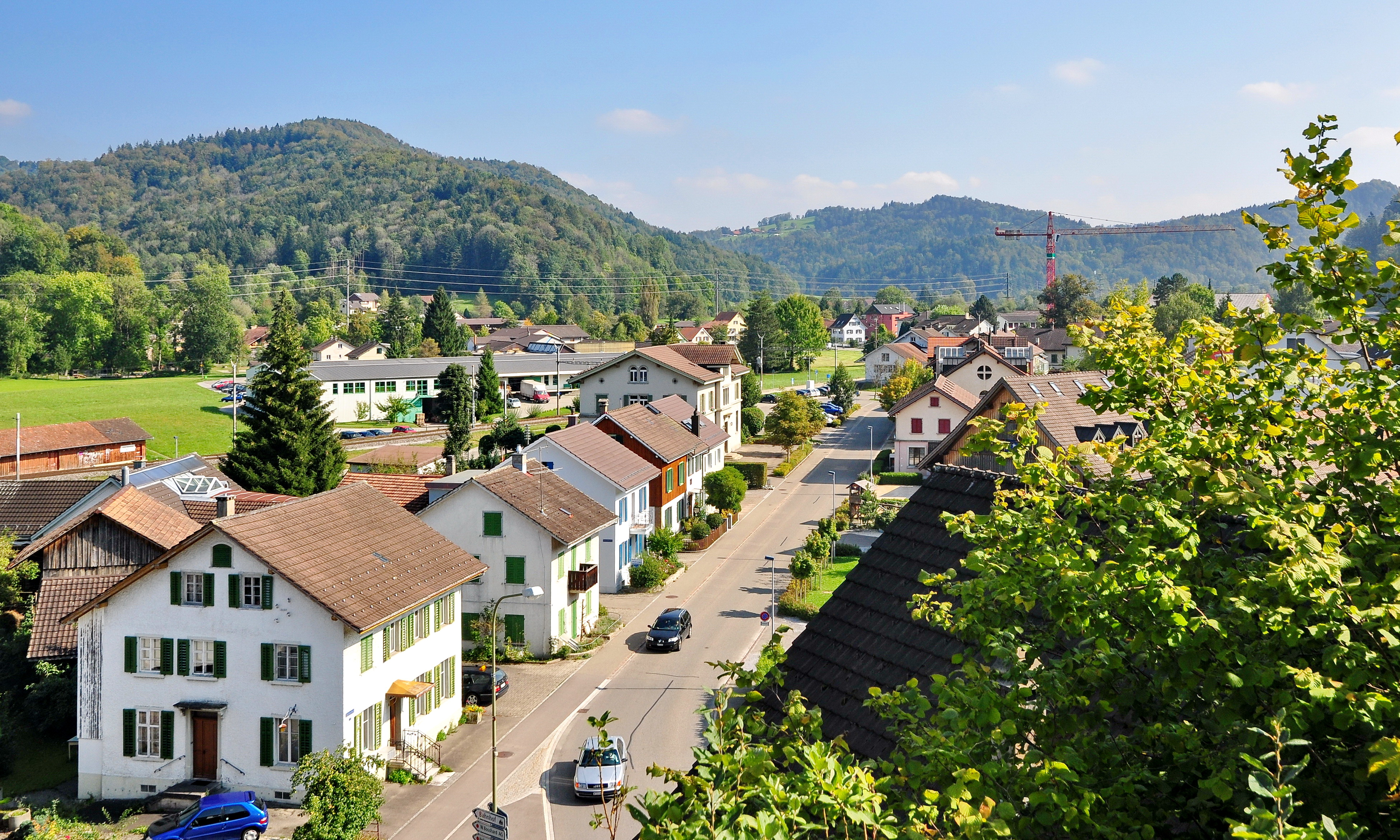 Wila (Switzerland)